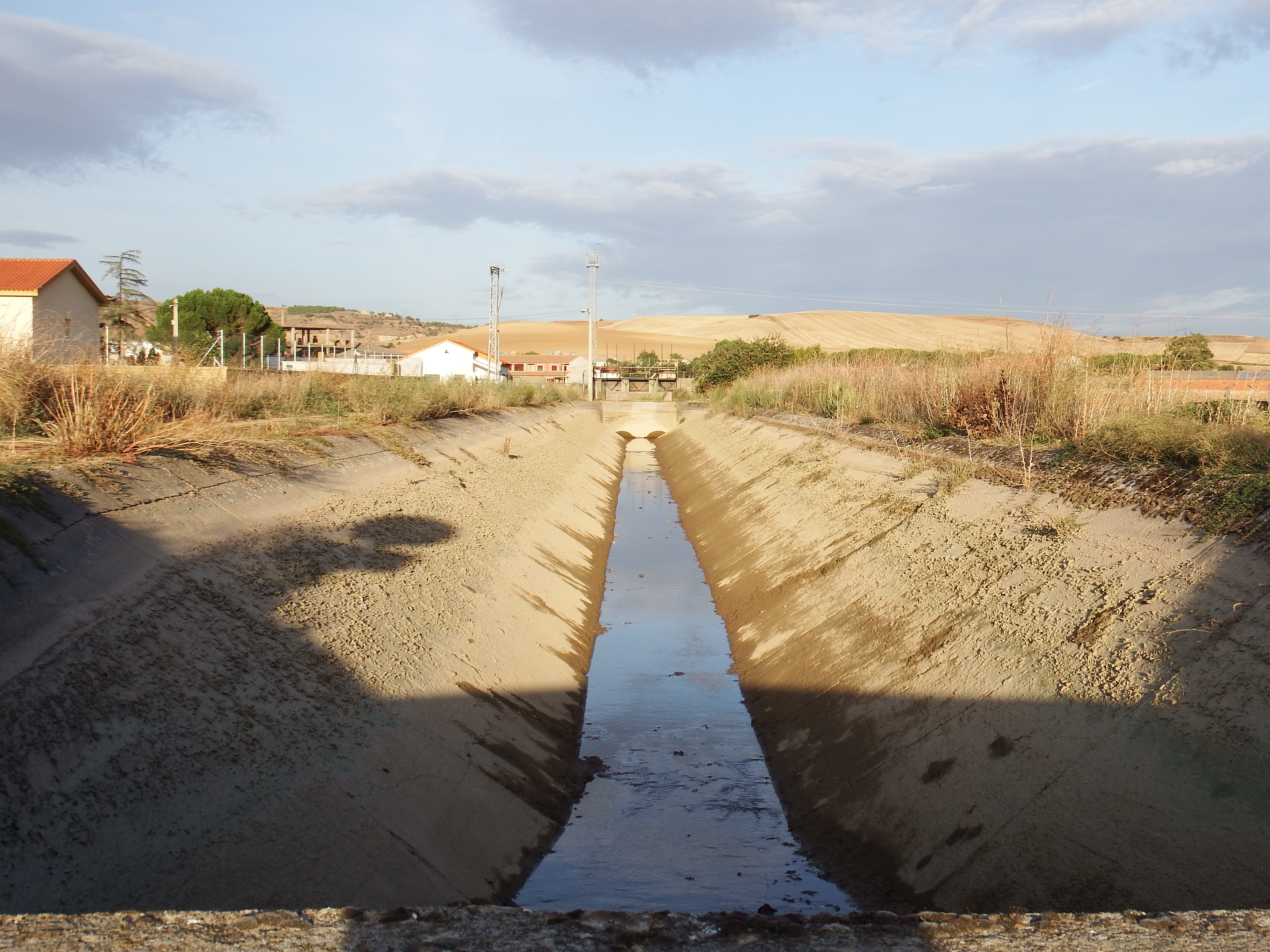 Coreses